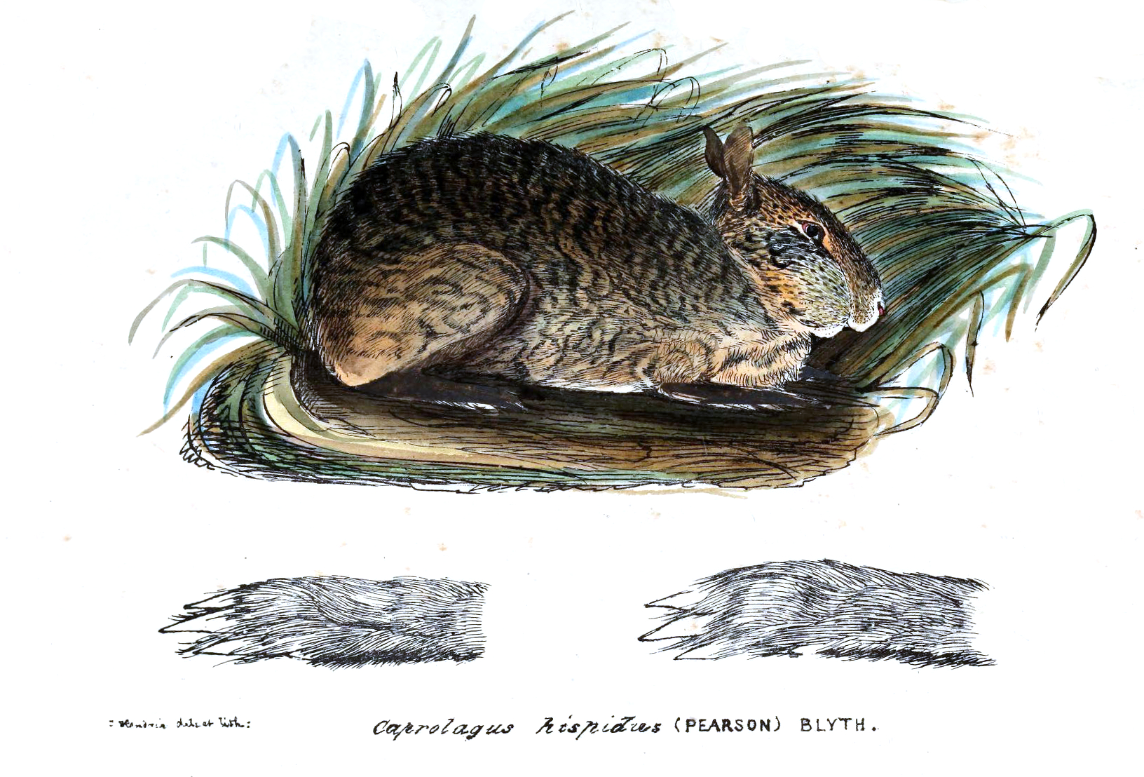 Hispid hare Caprolagus hispidus